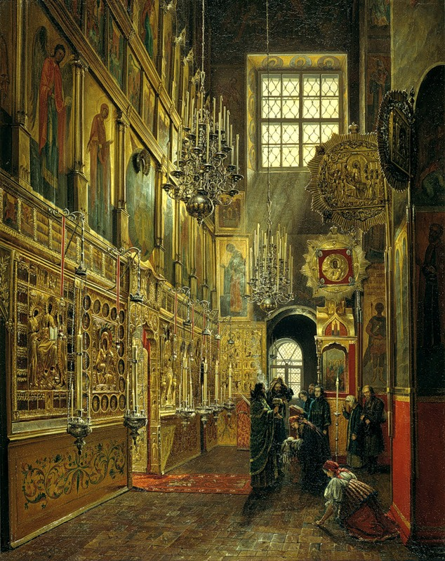 С. М. Шухвостов. «Обедня в московском Благовещенском соборе». 1857. Холст, масло. 90 × 71 см. Государственная Третьяковская галерея, Москва.